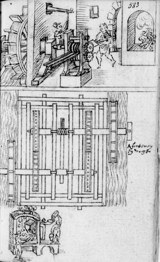 Plan d'un laminoir d'une forges de la vallée du Côney (Vosges) à Fontenoy-le-Château, dessin d'un ingénieur dans la première moitié du XVIIe S.